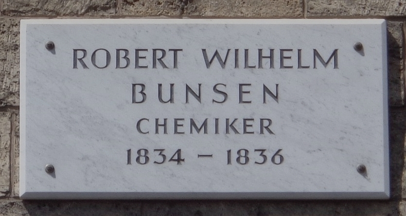 Göttinger Gedenktafel für Robert Wilhelm Bunsen (Goetheallee 22/23)